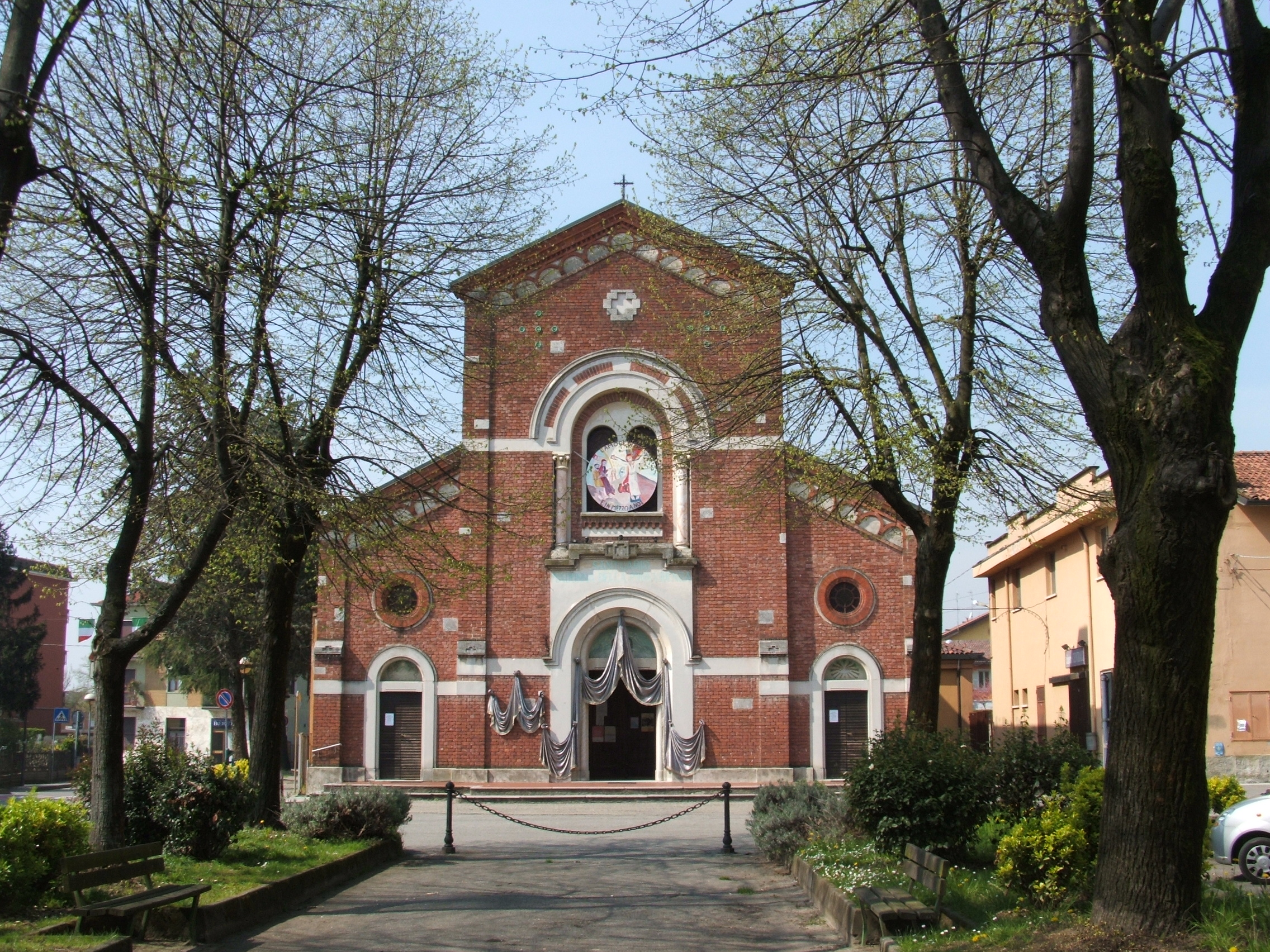 Chiesa di Pantigliate (MI)